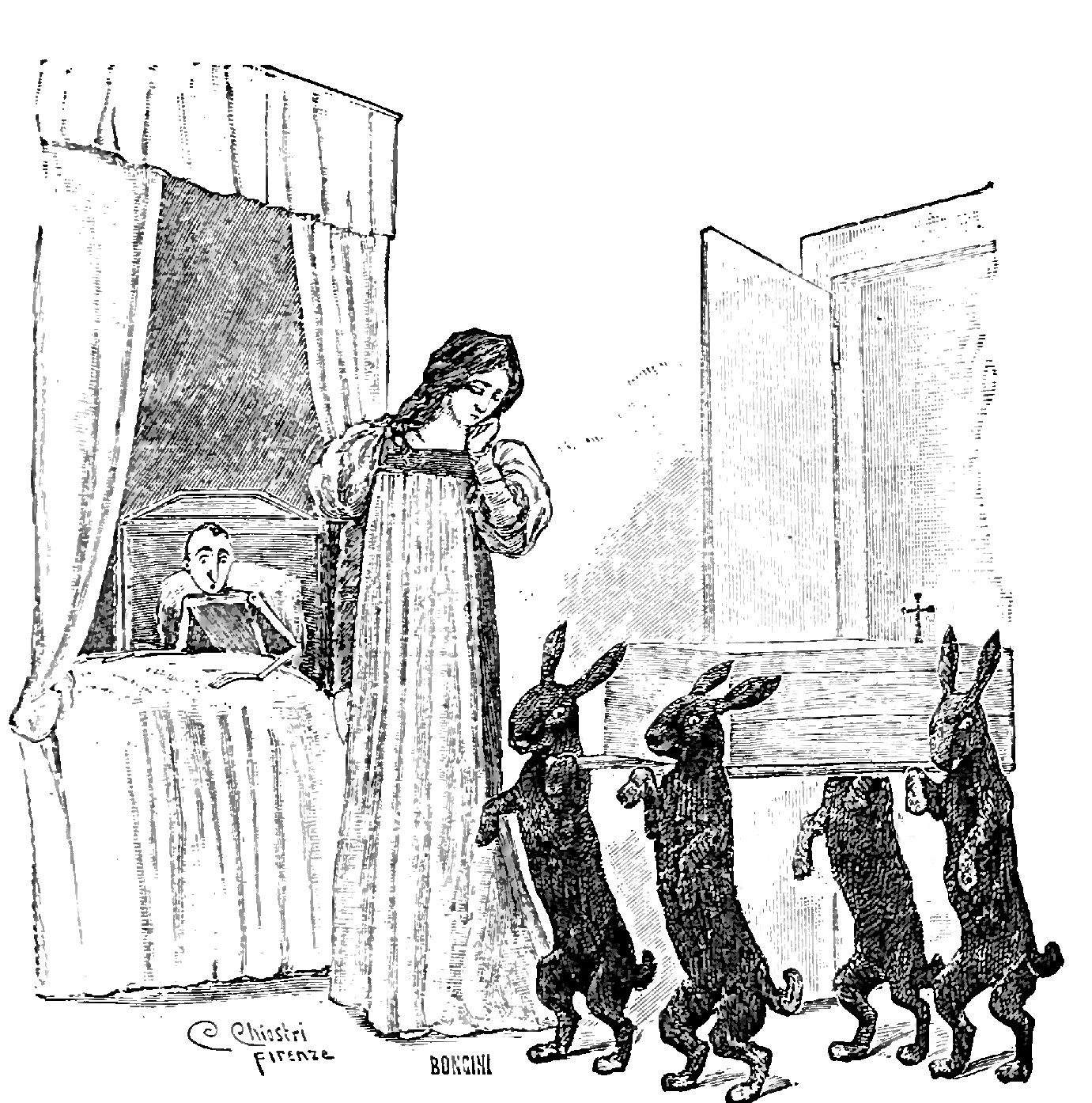 Illustrations from "Le avventure di Pinocchio, storia di un burattino", Carlo Collodi, Bemporad & figlio, Firenze 1902 (Drawings and engravings by Carlo Chiostri, and A. Bongini)